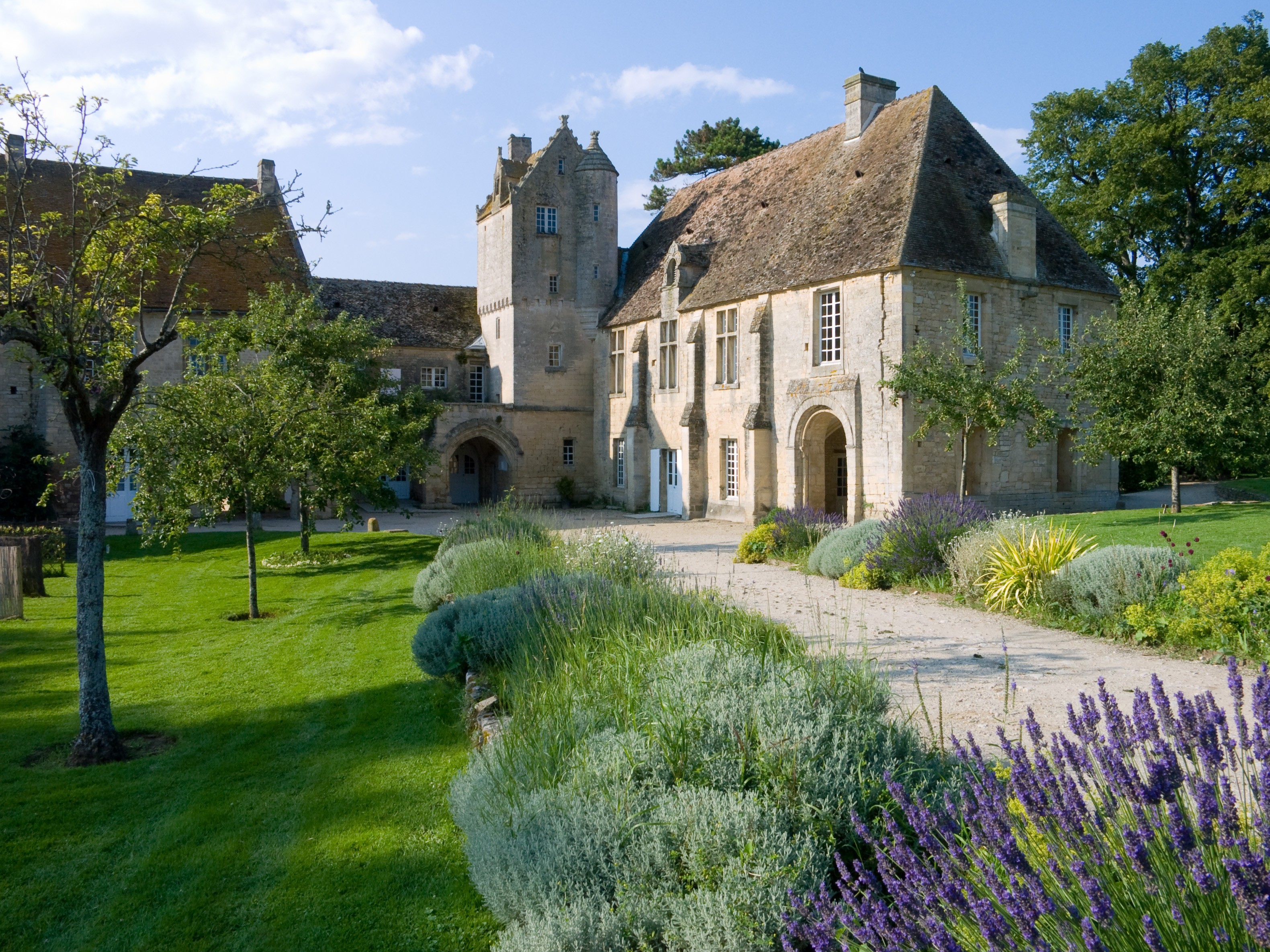 Ancien prieuré Saint-Gabriel (Calvados, France), transformé en école d'horticulture